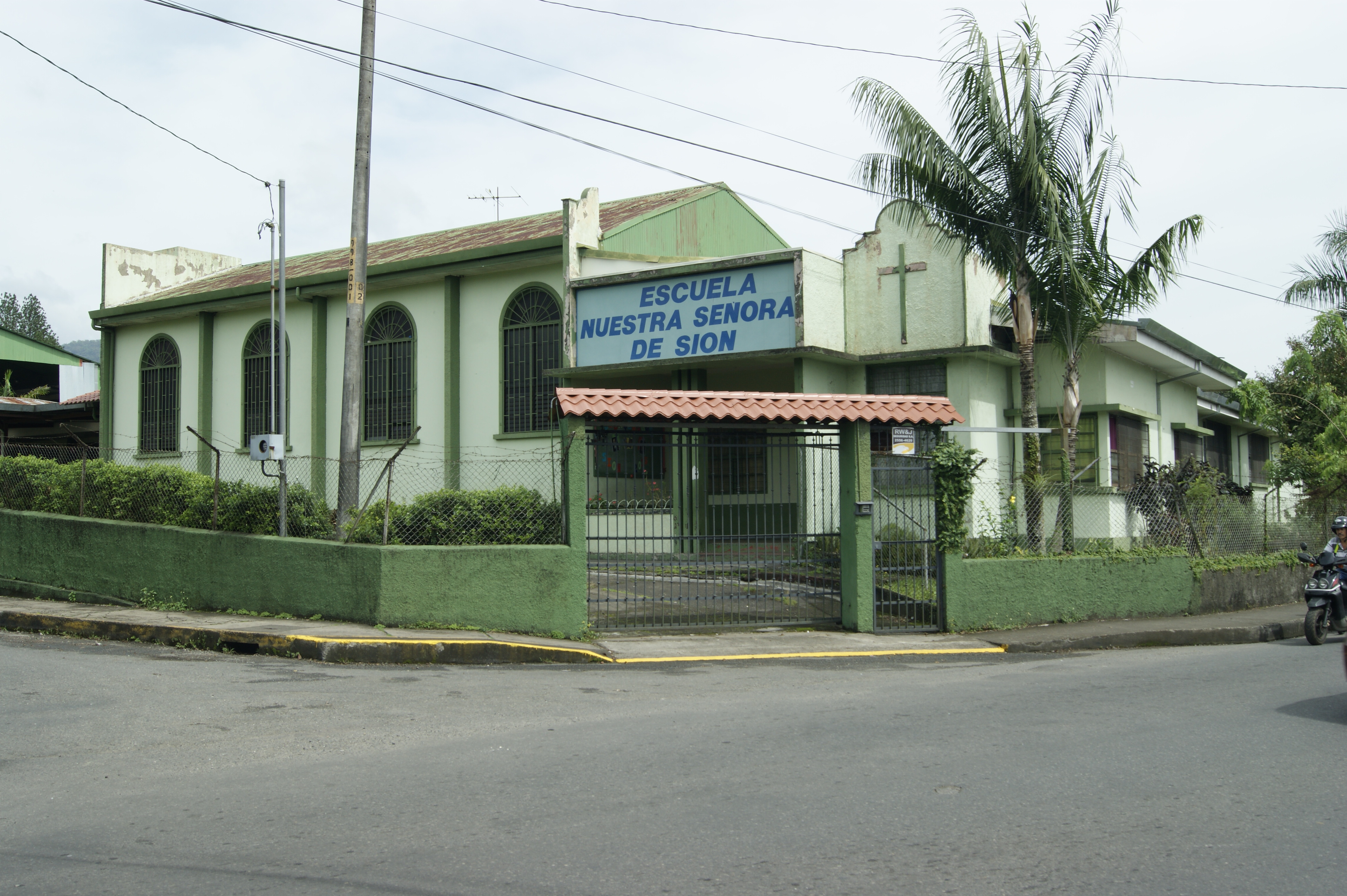 Esta fotografía muestra el viejo edificio donde se albergan las actividades de la Escuela de Sión en la ciudad de Turrialba.